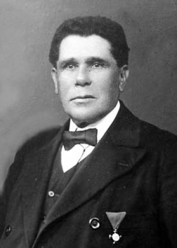 František Mlčoch český a československý politik a poslanec, starosta Postoupek (Kroměříž)